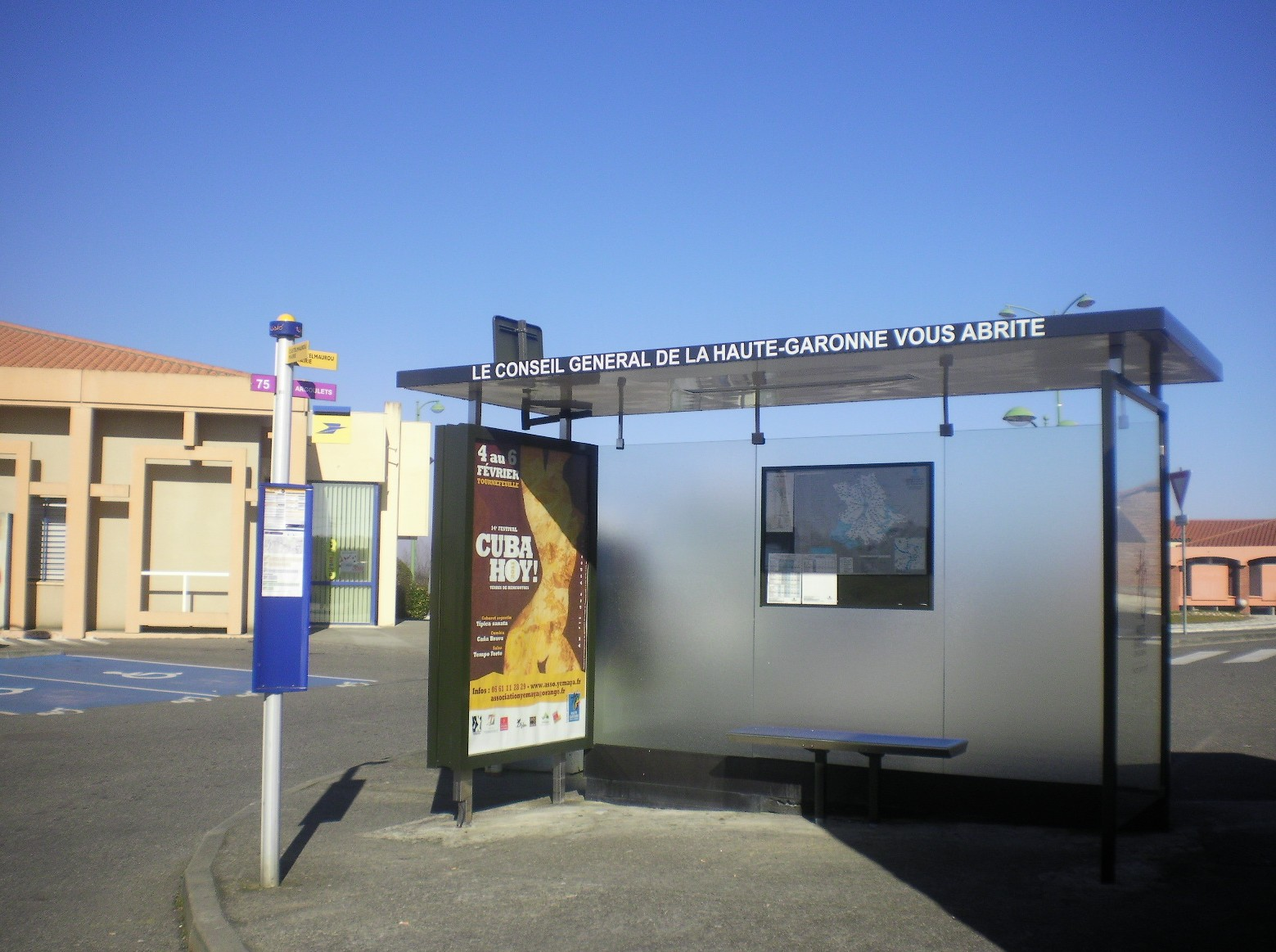 Abribus à Castelmaurou (Haute-Garonne, France).